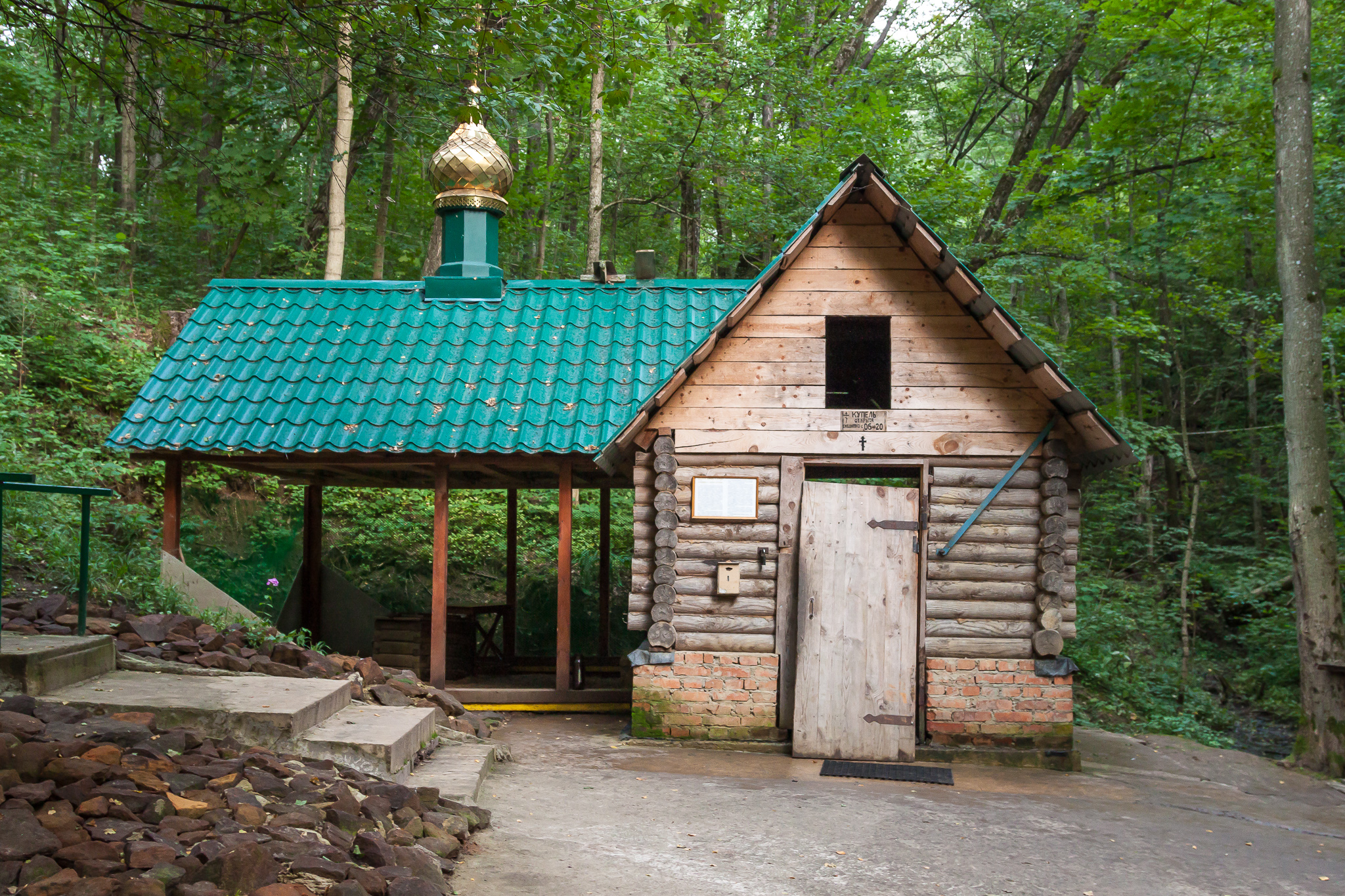 Купель Кукши рядом с деревней Фроловка Мценского района